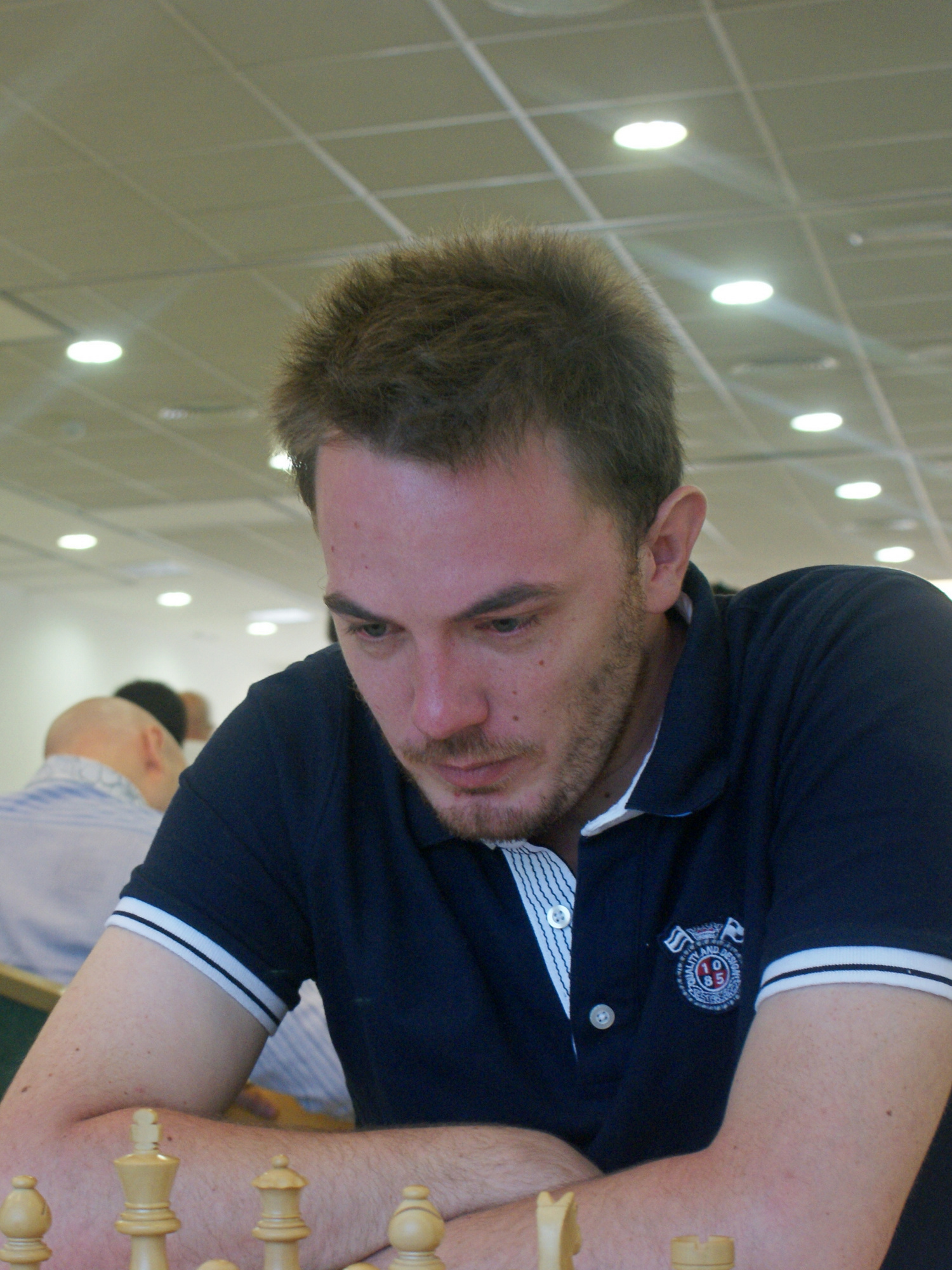 Yannick Gozzoli (FRA)